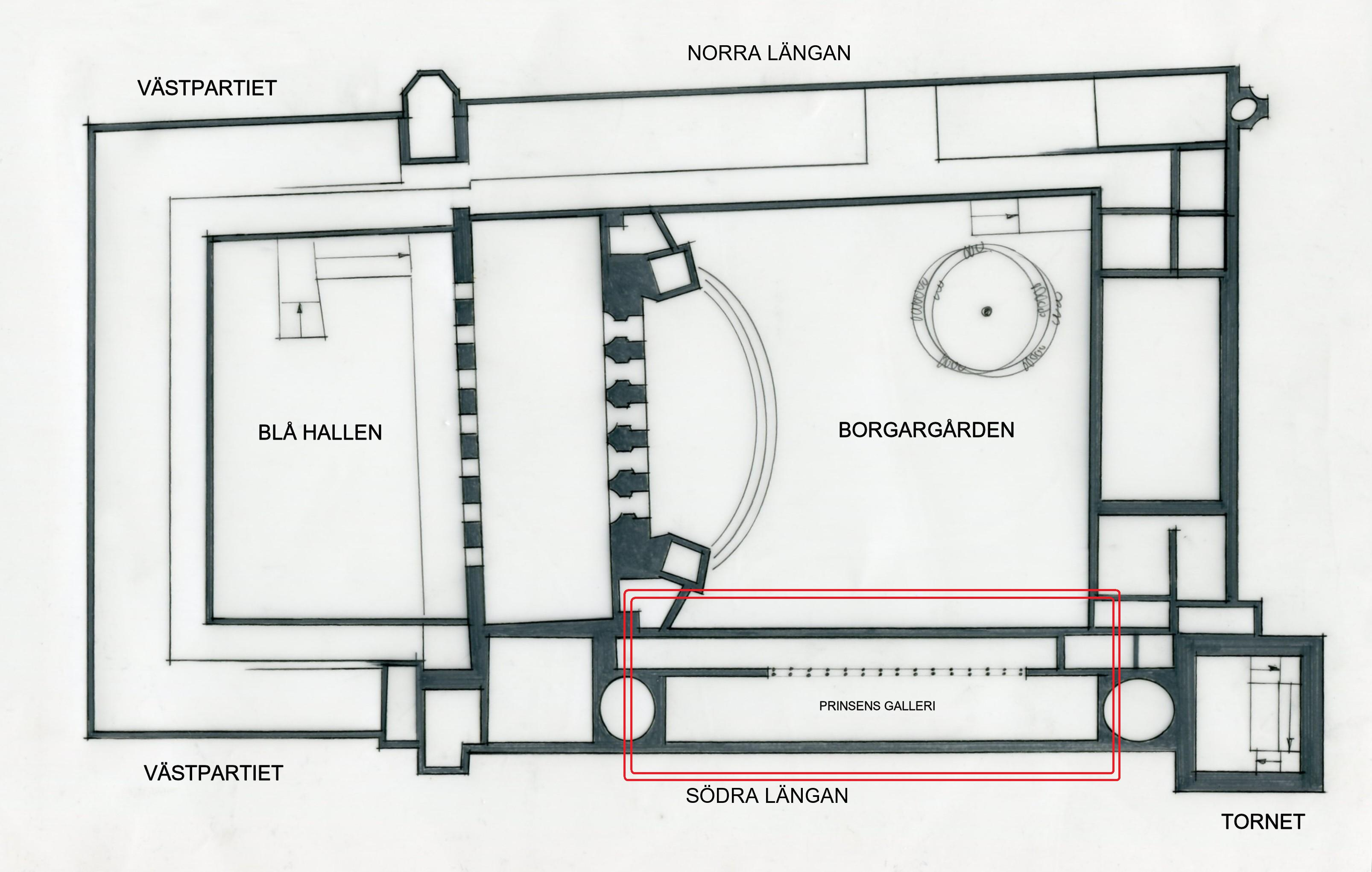 Stockholms stadshus översiktsplan våning 1 trappa, Prinsens galleri